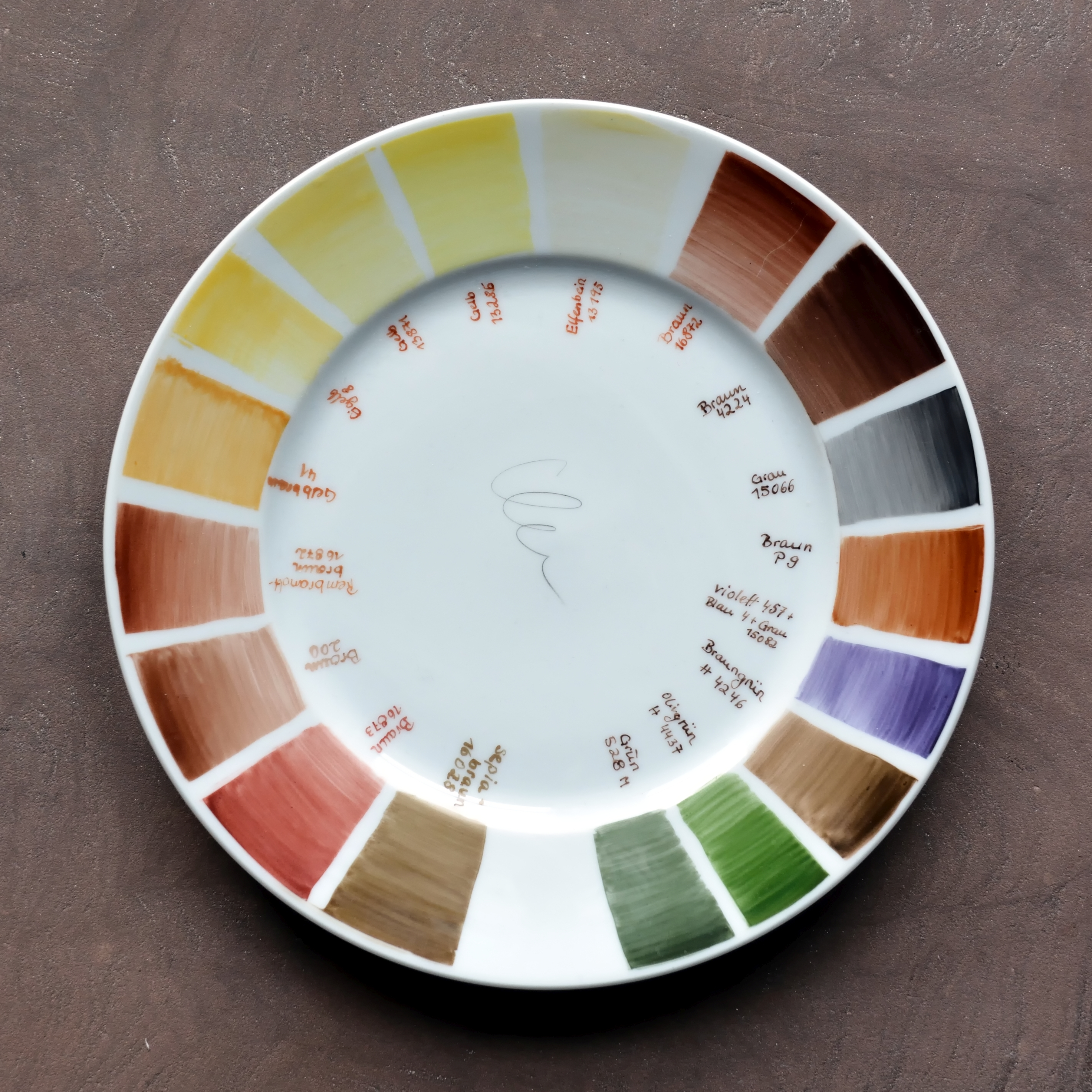 Impressionen vom Porzellanmuseum Schloss Fürstenberg Besucherwerkstatt, Porzellanfarben